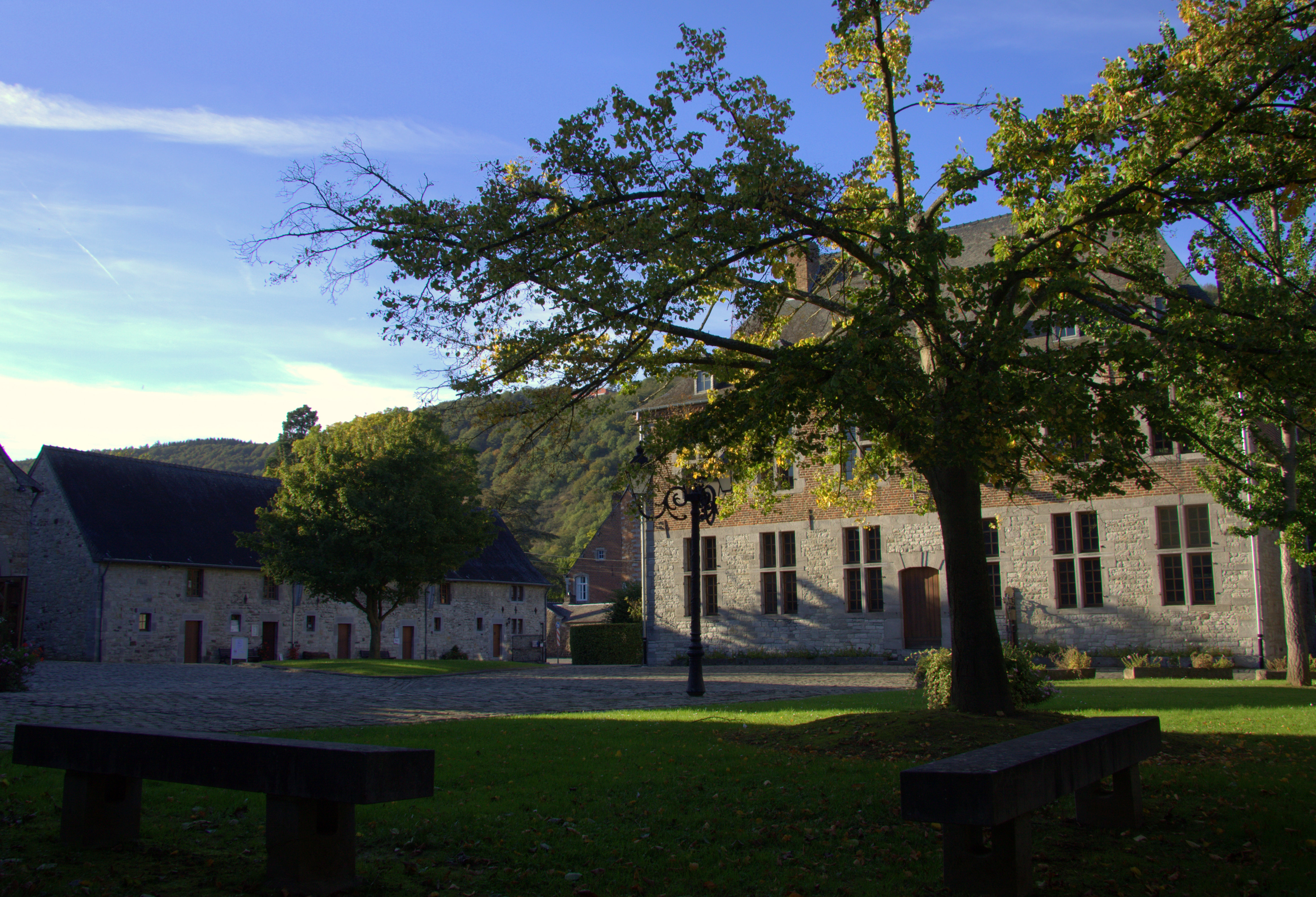 Les bâtiments ayant appartenu à l'ancienne Seigneurie de Godinne, à savoir : la tour de l'église Saint-Pierre, le château style Renaissance espagnole y accolé et la grande ferme (avec corps de logis, écuries, grange, etc.), séparée des édifices précédents par la route de Rouillon (M) et ensemble formé par les édifices précités et leurs abords (S)